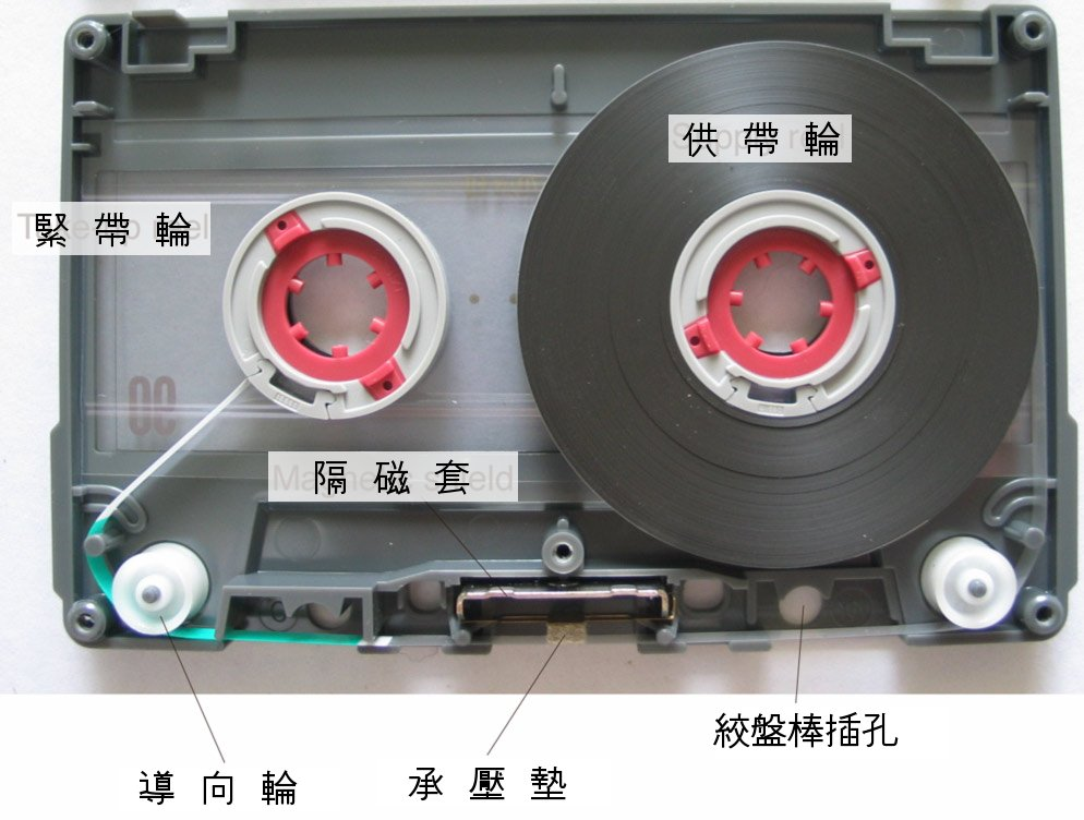 卡式录音带的组成